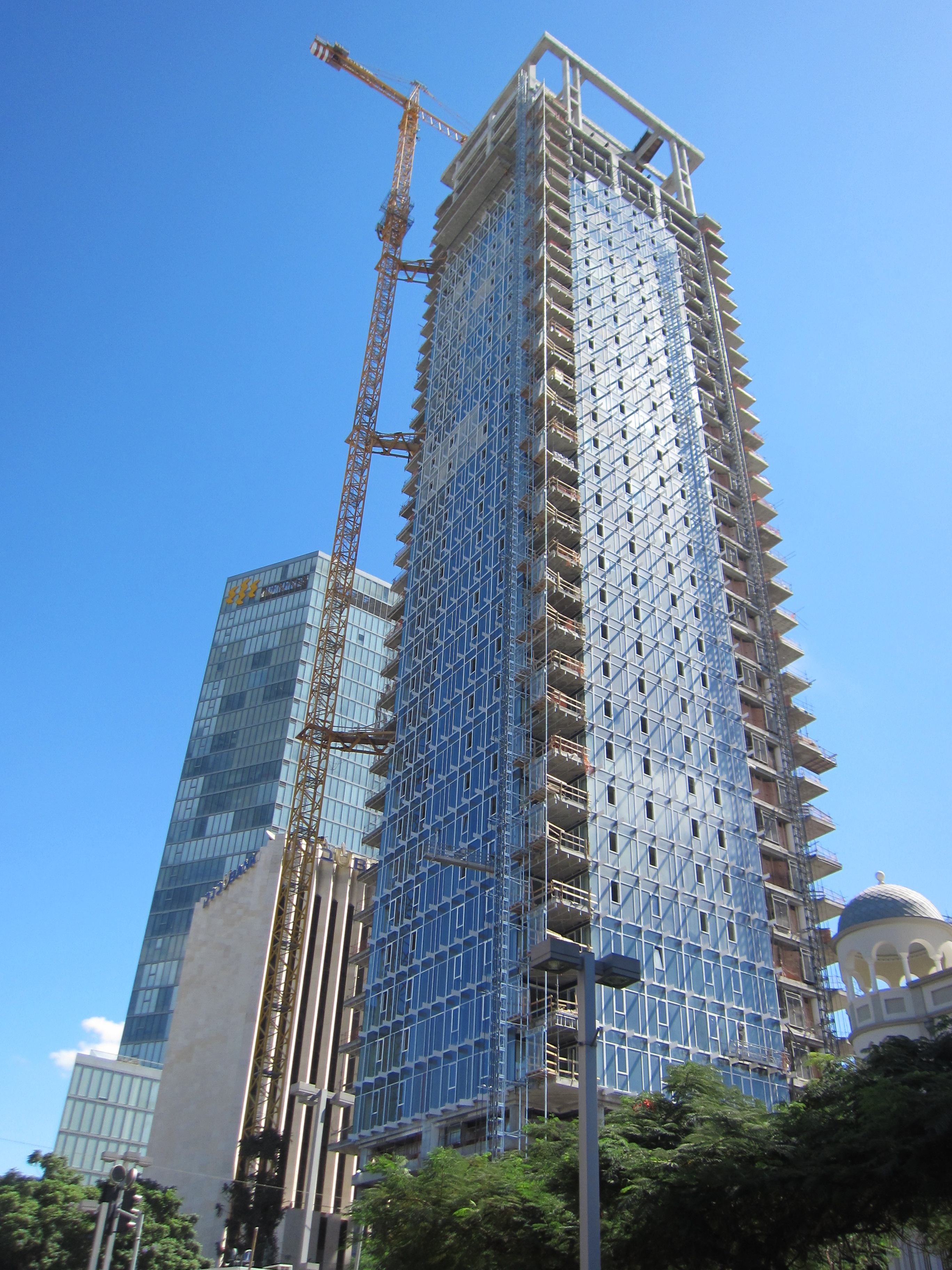 שדרות רוטשילד היו בין ארבעת הרחובות הראשונים של תל אביב (שנקראה אז "אחוזת בית"), שנחנכו לאחר רחוב הרצל (הרחוב הראשון בעיר), ובניצב אליו. הרחובות נסללו על גבי דיונות חול אשר יושרו ושוטחו, ולאורכם נבנו בתיה הראשונים של העיר. התוואי שהפך להיות השדרה היה ואדי קטן שאותו קשה היה ליישר באמצעים של אז, ואליו גם התנקזו מים רבים בחורף. בשל כך הוחלט למלאו בחול להשאירו כשטח פתוח שעליו לא ייבנו בתים אלא בצדיו, כרחוב עירוני רחב יותר. בט"ו בשבט ה'תר"ע (1910) החלו נטיעות בשטח פתוח זה, במטרה להפוך את הרחוב לשדרה הראשונה של העיר. חודשים אחדים לאחר מכן, בדצמבר 1910, החליט ועד אחוזת בית לקרוא לשדרה על שם הברון רוטשילד, ולמנות את מרדכי בן הלל הכהן ואת מאיר דיזנגוף להודיע על כך באופן רשמי לברון. אנשי אחוזת בית ראו בשדרה את תחילתה של שדרה מפוארת כדוגמת הבולווארים המפוארים של פריז.